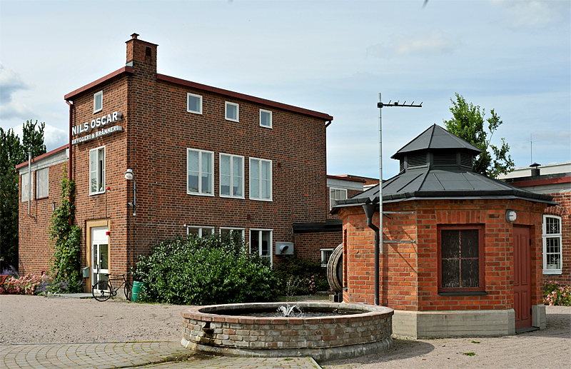 Nils Oscar Company AB vid Fruängskällan i Nyköpings kommun.